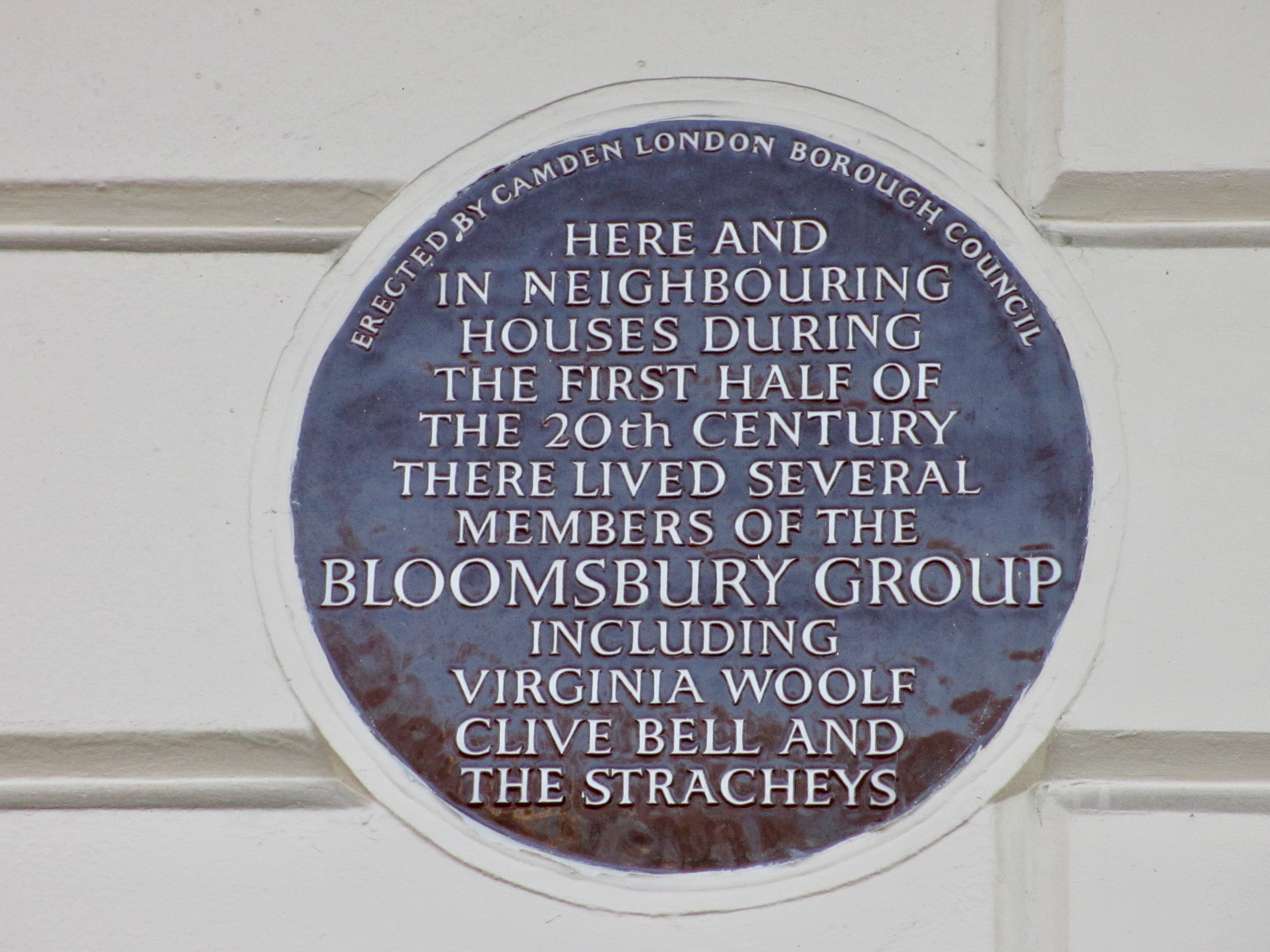 Blue Plaque - Bloomsbury Group - Gordon Square London